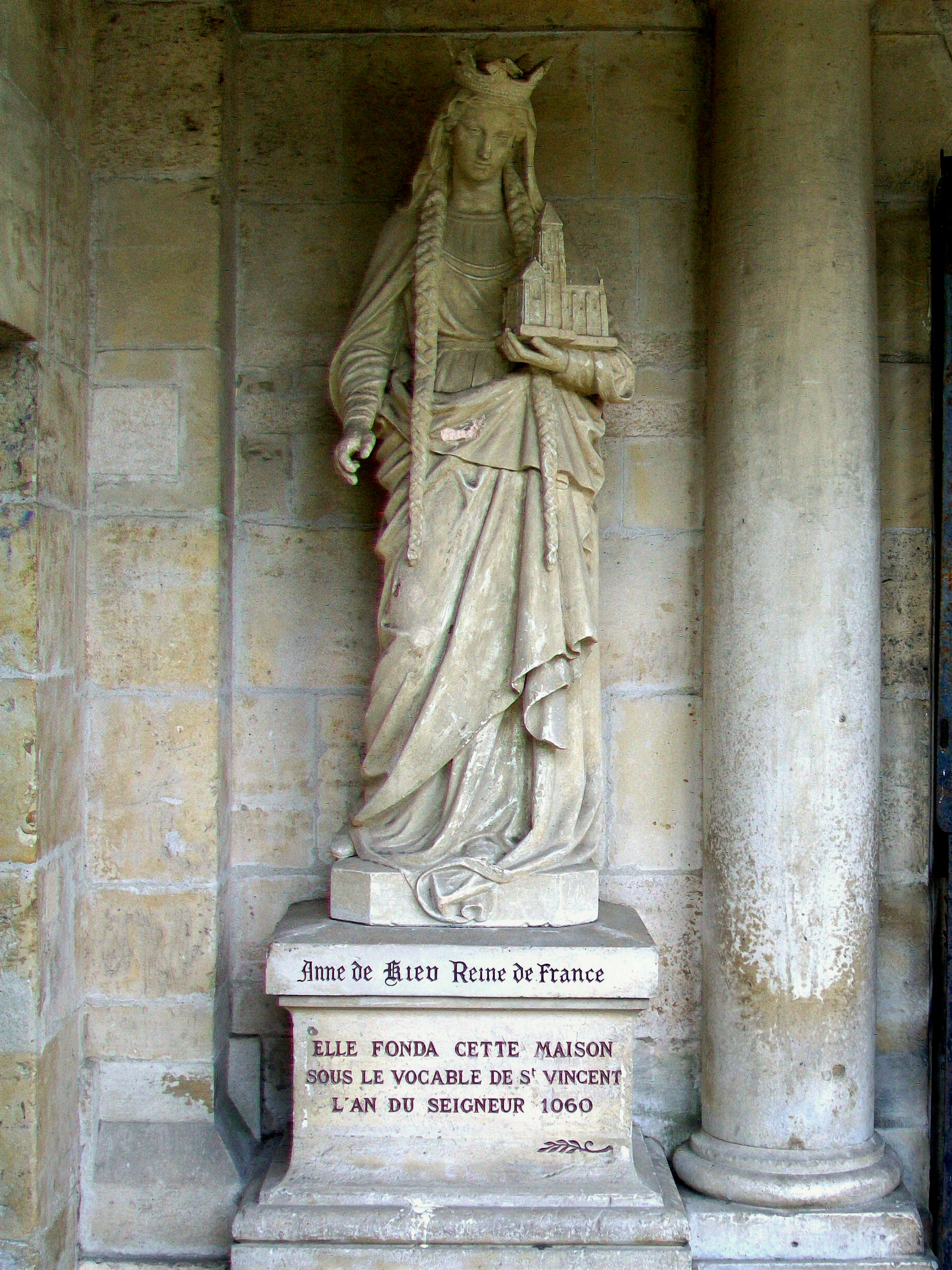 Abbaye Saint-Vincent, Senlis (Oise), France : Statue d'Anne de Kiev à gauche du portail ; l'inscription fait remonter la fondation à 1060 (année de la reconstruction de la chapelle primitive) au lieu de 1065.